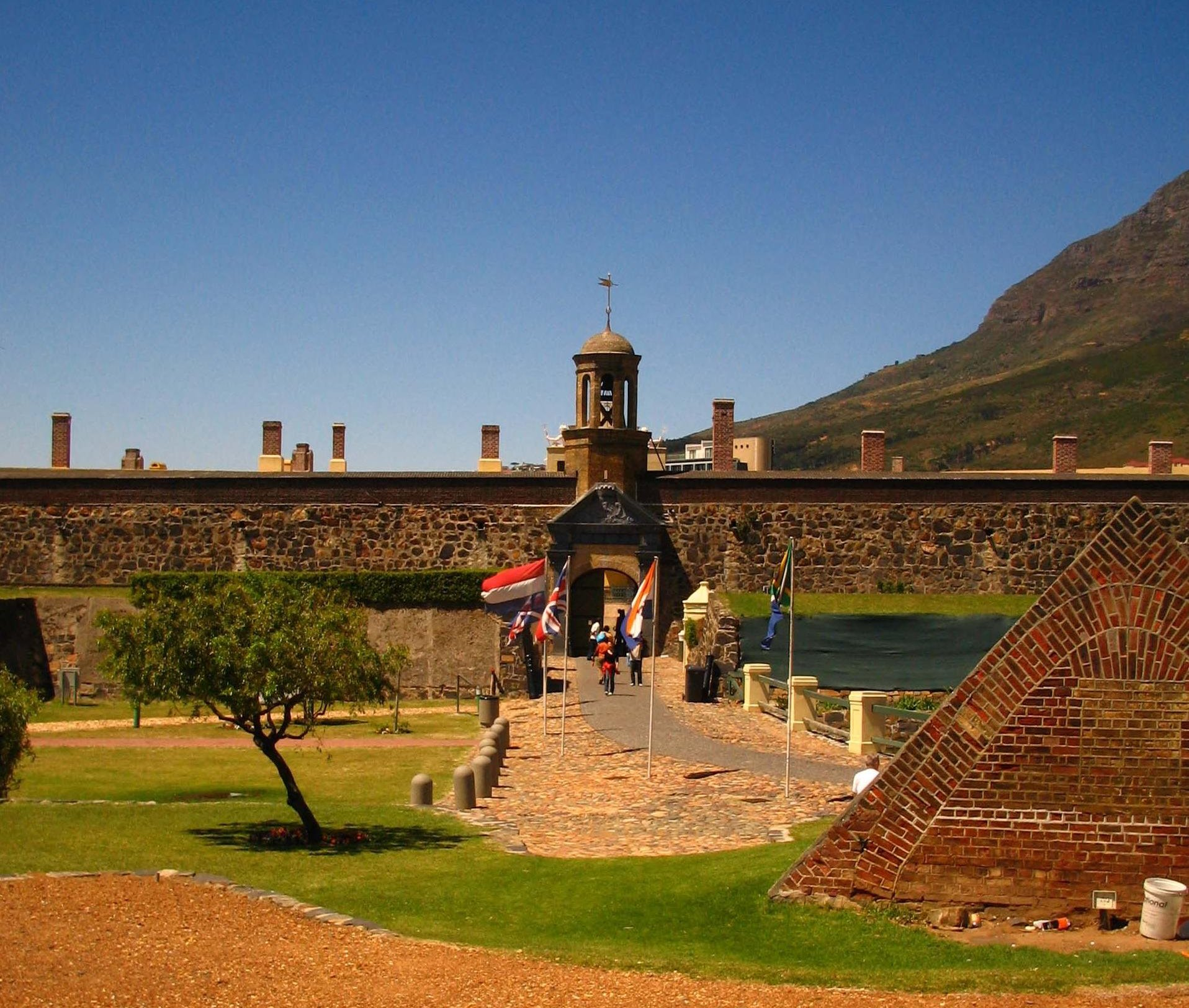 Hoofdingang van Kasteel de Goede Hoop, Kaapstad. Interlingua: Entrata principal del Castello de Bon Esperantia, Citate del Capo.